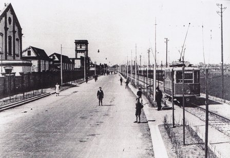 Pavia, 1930s, SNIA